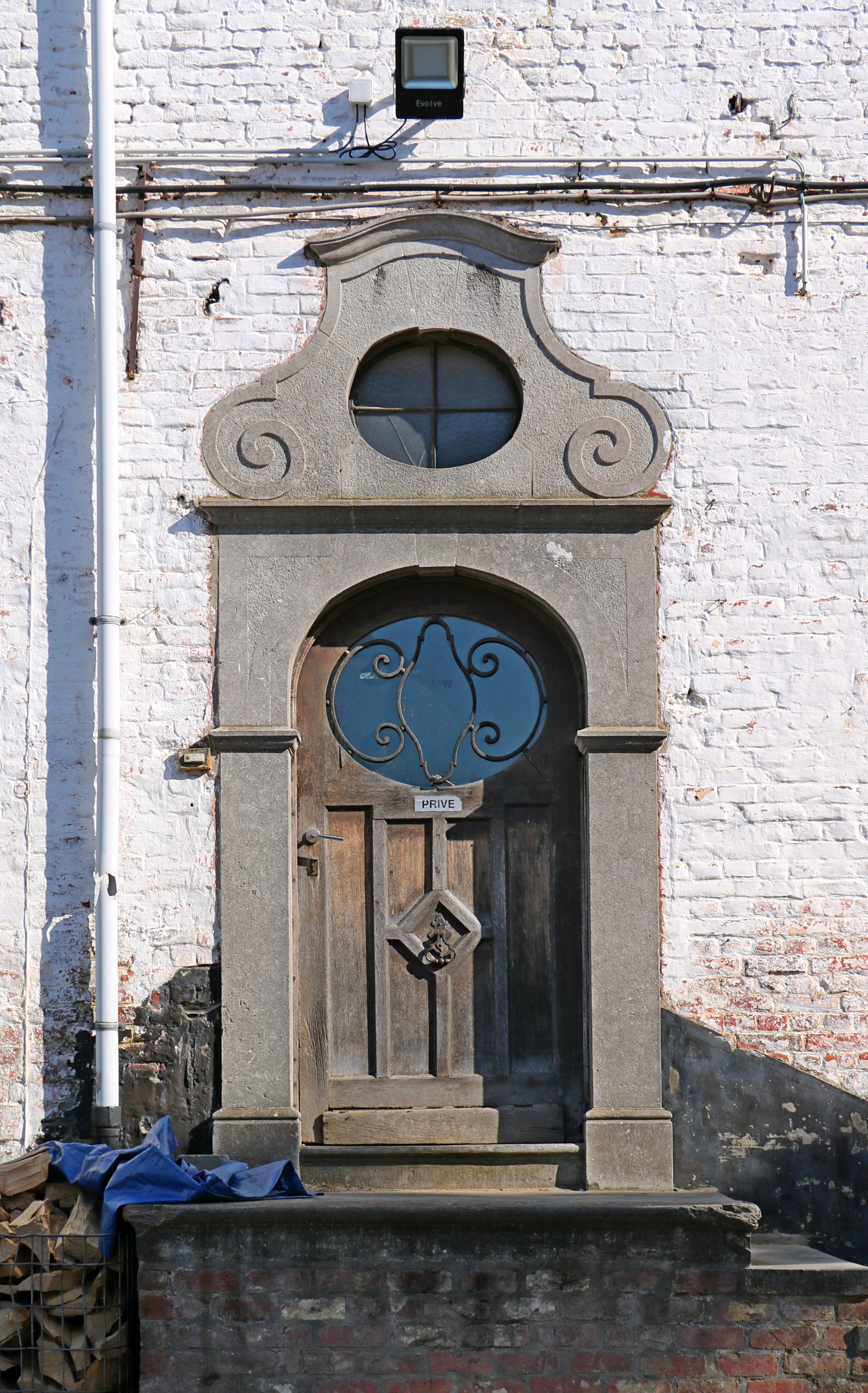 Belgique - Brabant wallon - Ottignies-Louvain-la-Neuve - Ferme du Biéreau